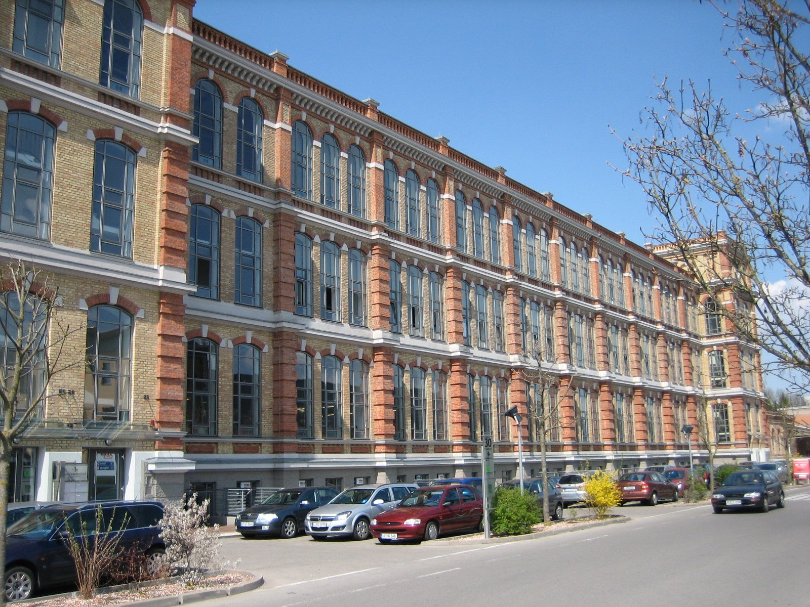 Augsburg, Fabrikschloss im Textilviertel, Fassade der Ostseite